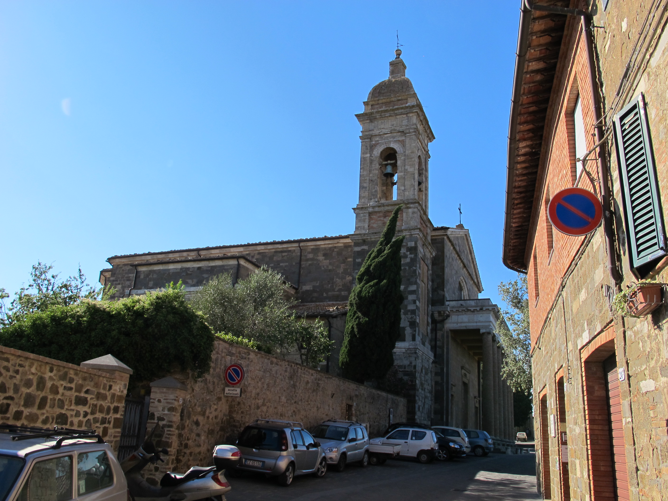 Duomo di montalcino